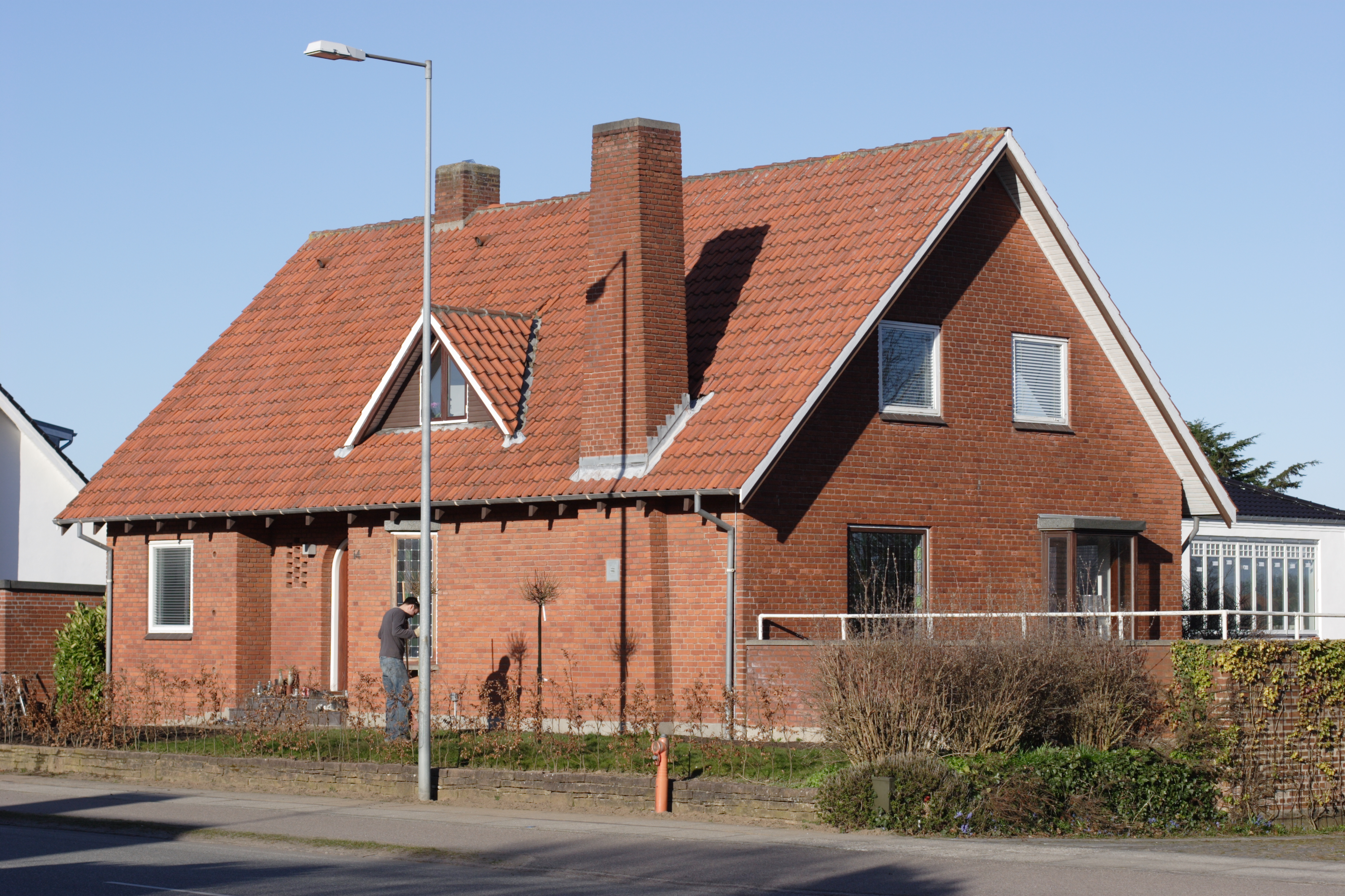 Murermestervilla i Risskov opført i 1956